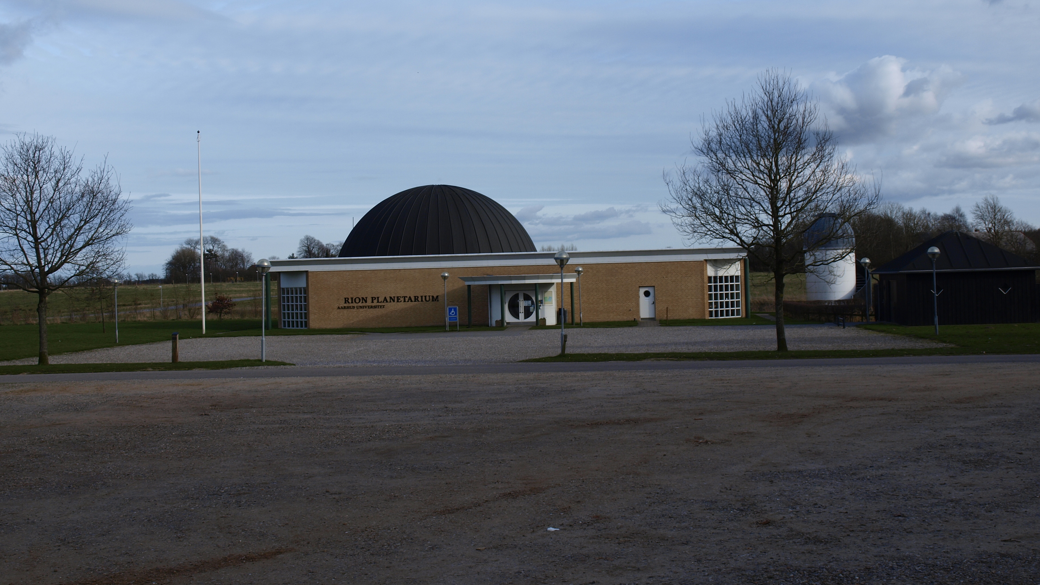 Orion Planetarium - 5. april 2015